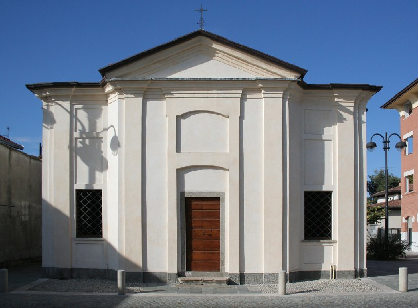 l'Oratorio della Confraternita del Santissimo Sacramento a Solaro (MI), progettata da Biagio Bellotti dopo il 1762.